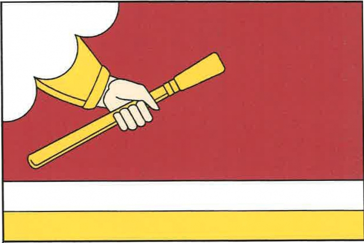 vlajka,Kmetiněves , okres Kladno